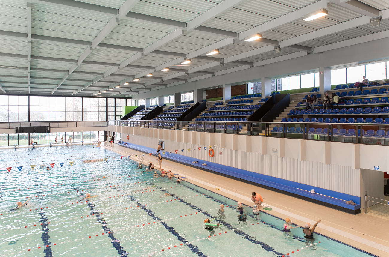 Piscine Hélios rénovée à Charleroi